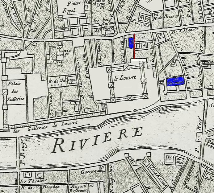 Extrait du plan de Nicolas de Fer d'après Jouvin de 1676 autour du Louvre.1 S. Nicolas du louvre - 2 S. Thomas du louvre - 3 les P. de Loratoire - 4 H. de Crequy - 5 H. daligre - 6 H de Sourdy.